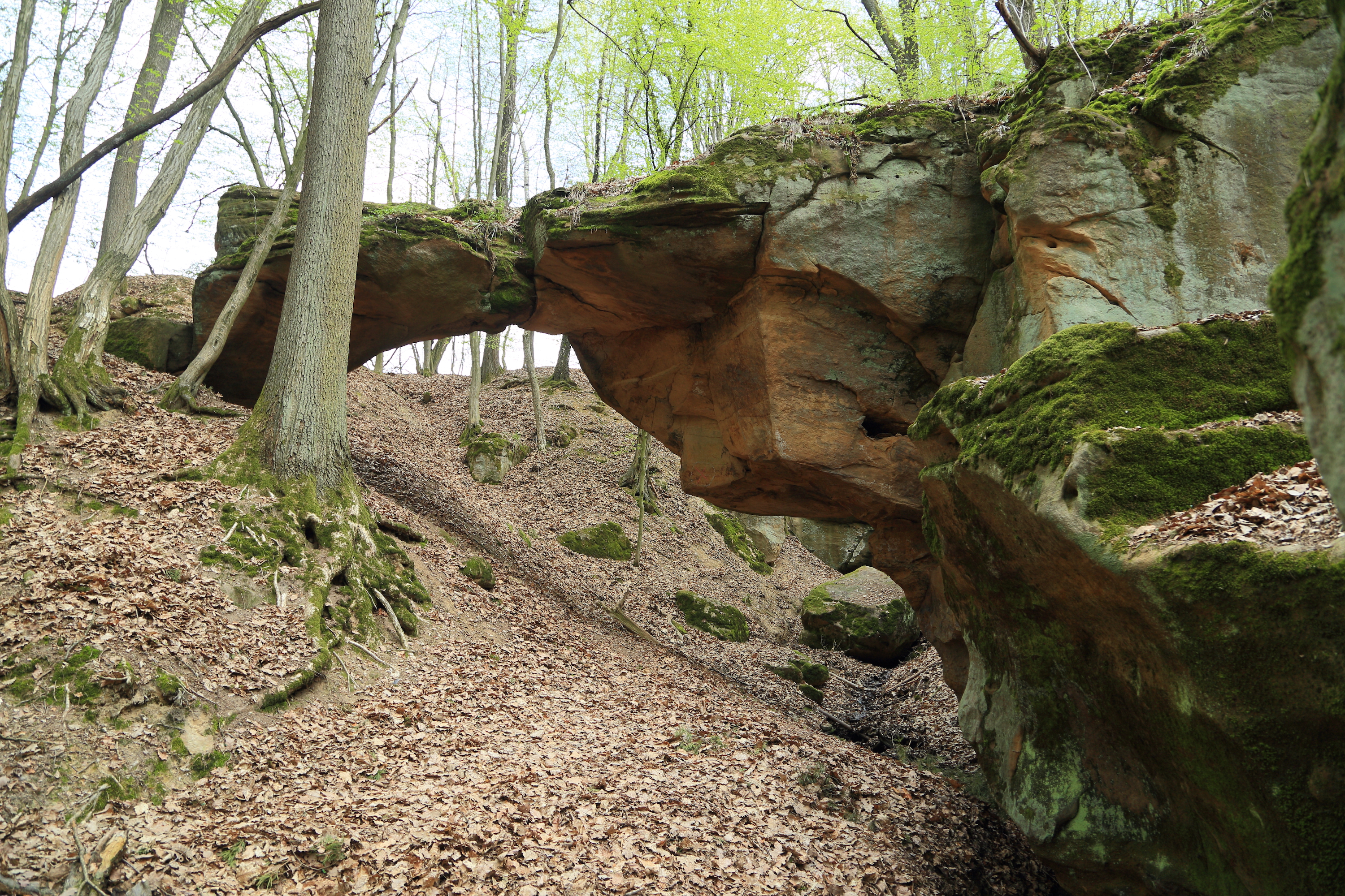 Teufelsgraben mit Teufelsbrücke ENE von Donndorf